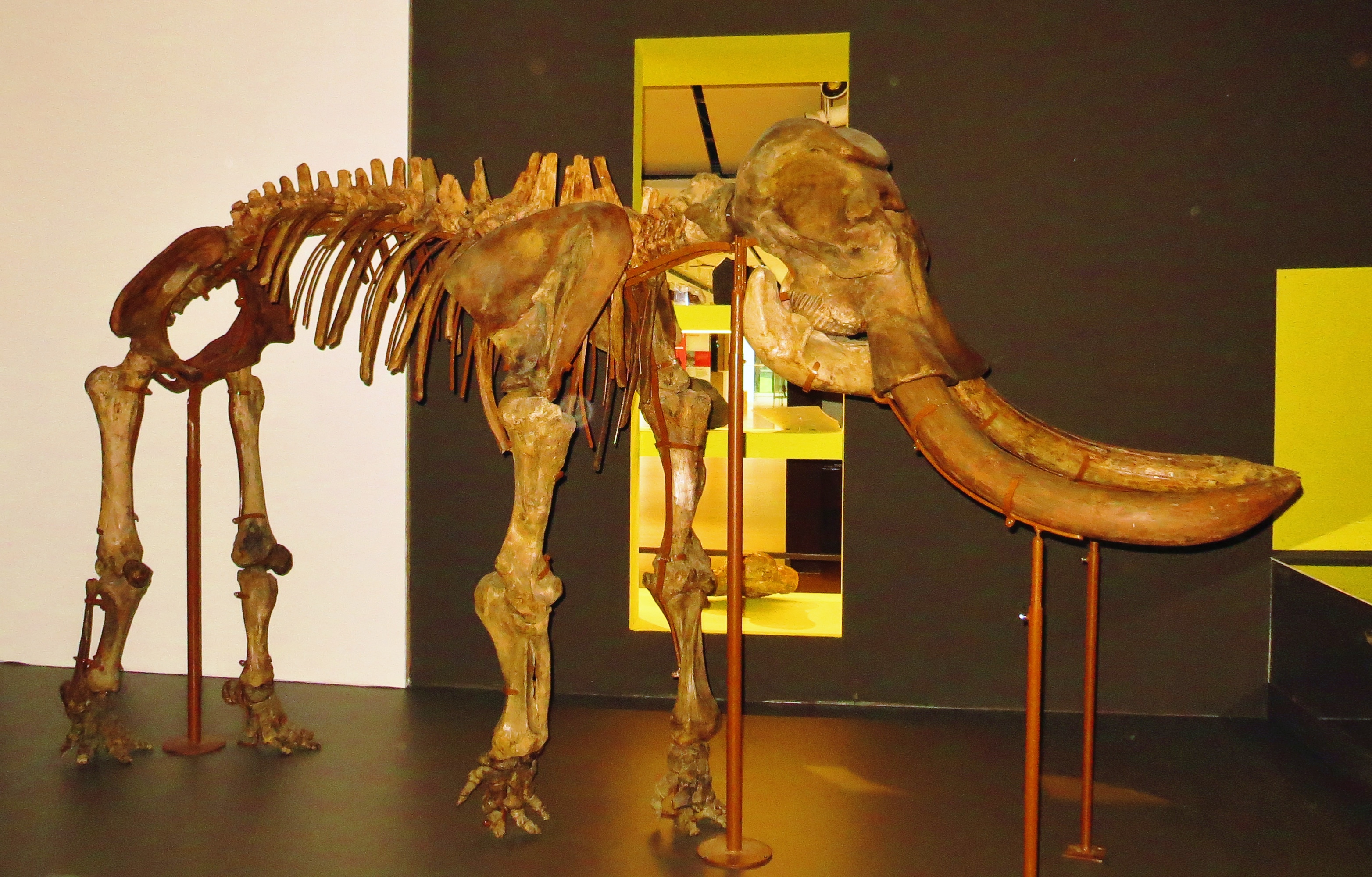 Fossil of Palaeoloxodon mnaidriensis - Took the picture at MUSE, Trento